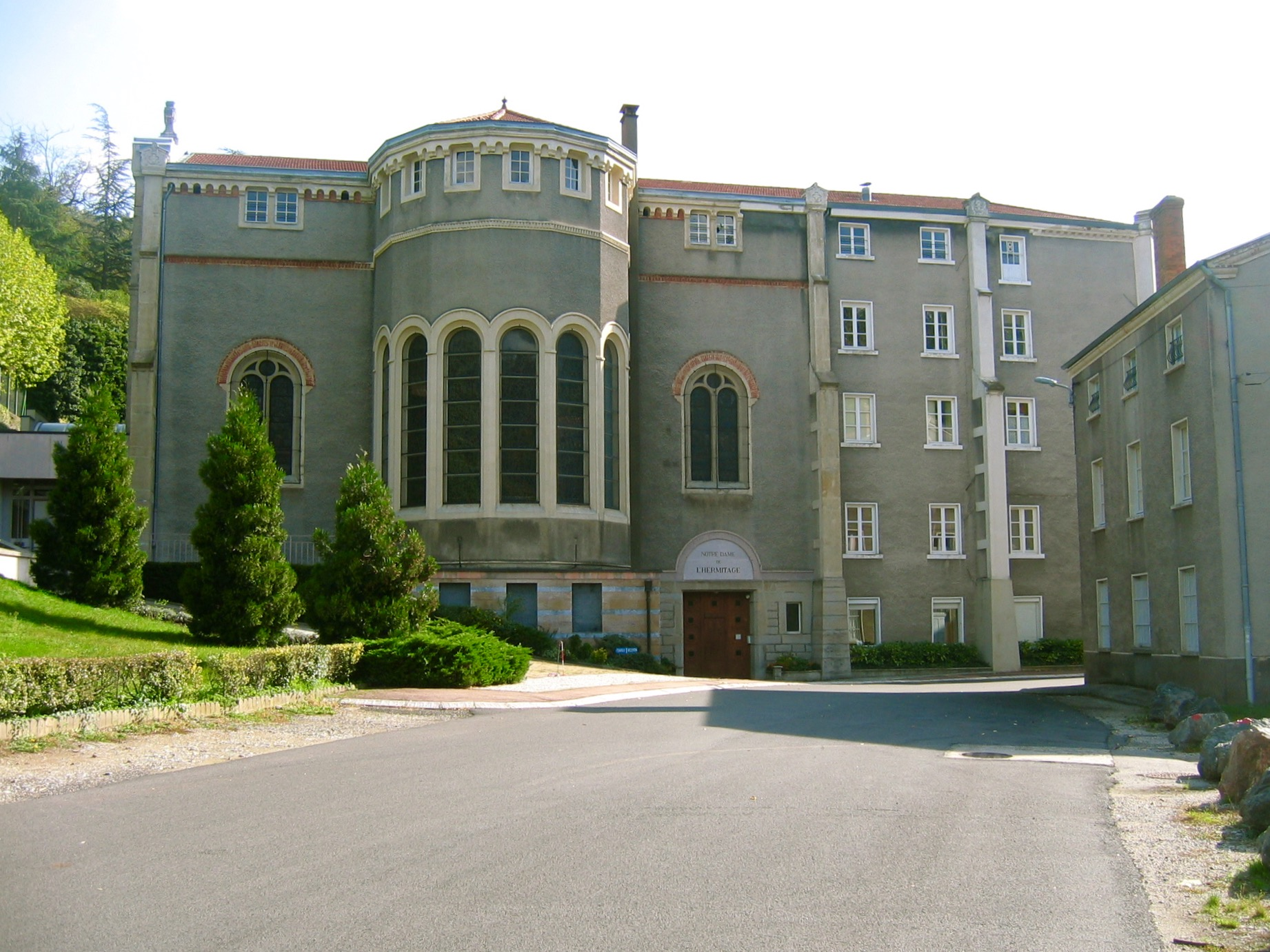 Saint-Martin-en-Coailleux (Loire), Notre-Dame de l'Hermitage, entrée, 22 octobre 2006.